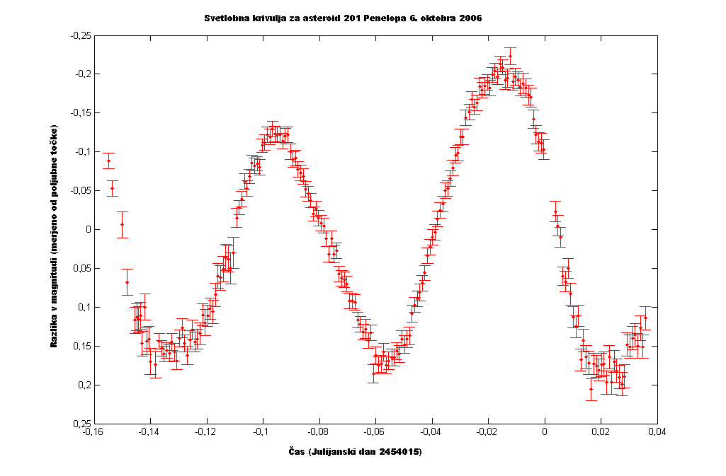 Prikazana je svetlobna krivulja za asteroid 201 Penelopa. Posnetek je bil narejen 6. oktobra 2006 na Observatoriju Mount John University.